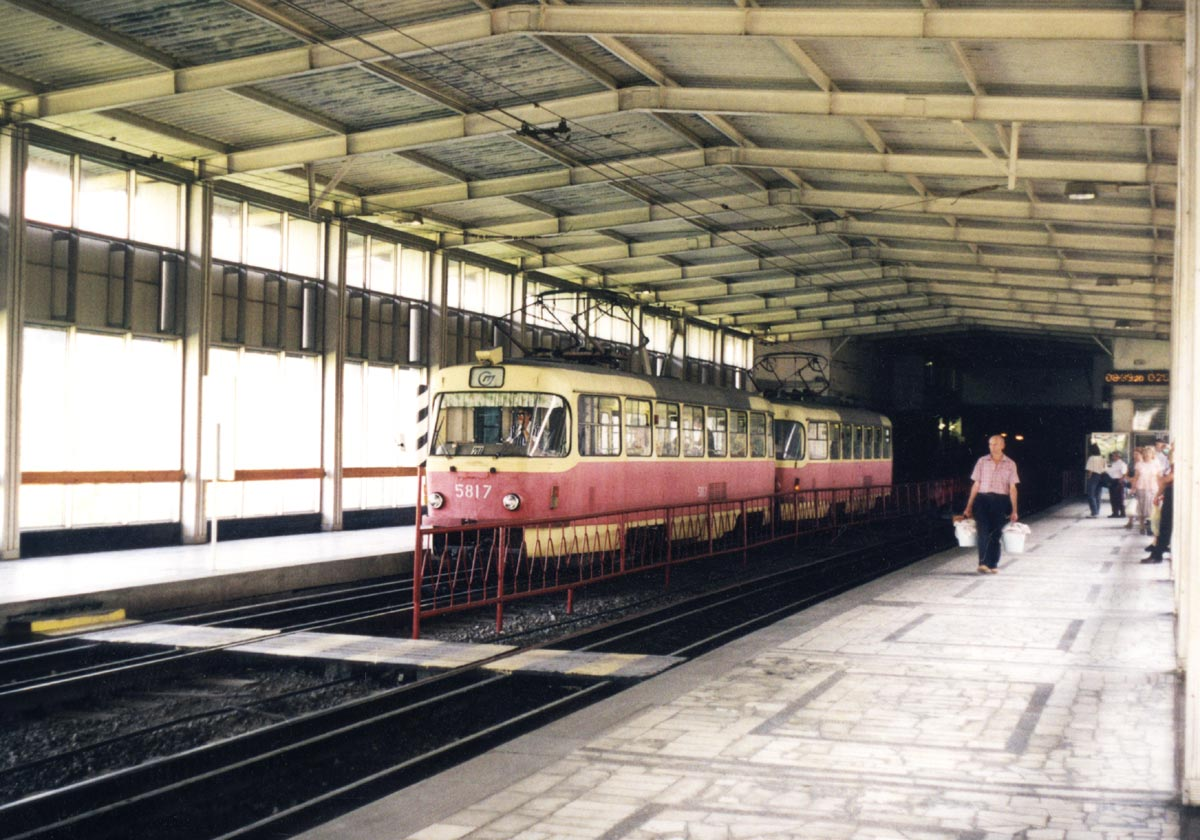 Станция Пионерская Волгоградского скоростного трамвая (метротам). Вид внутри.